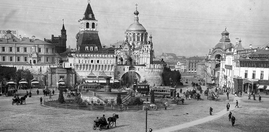 "Никольский фонтан" в центре Лубянской площади